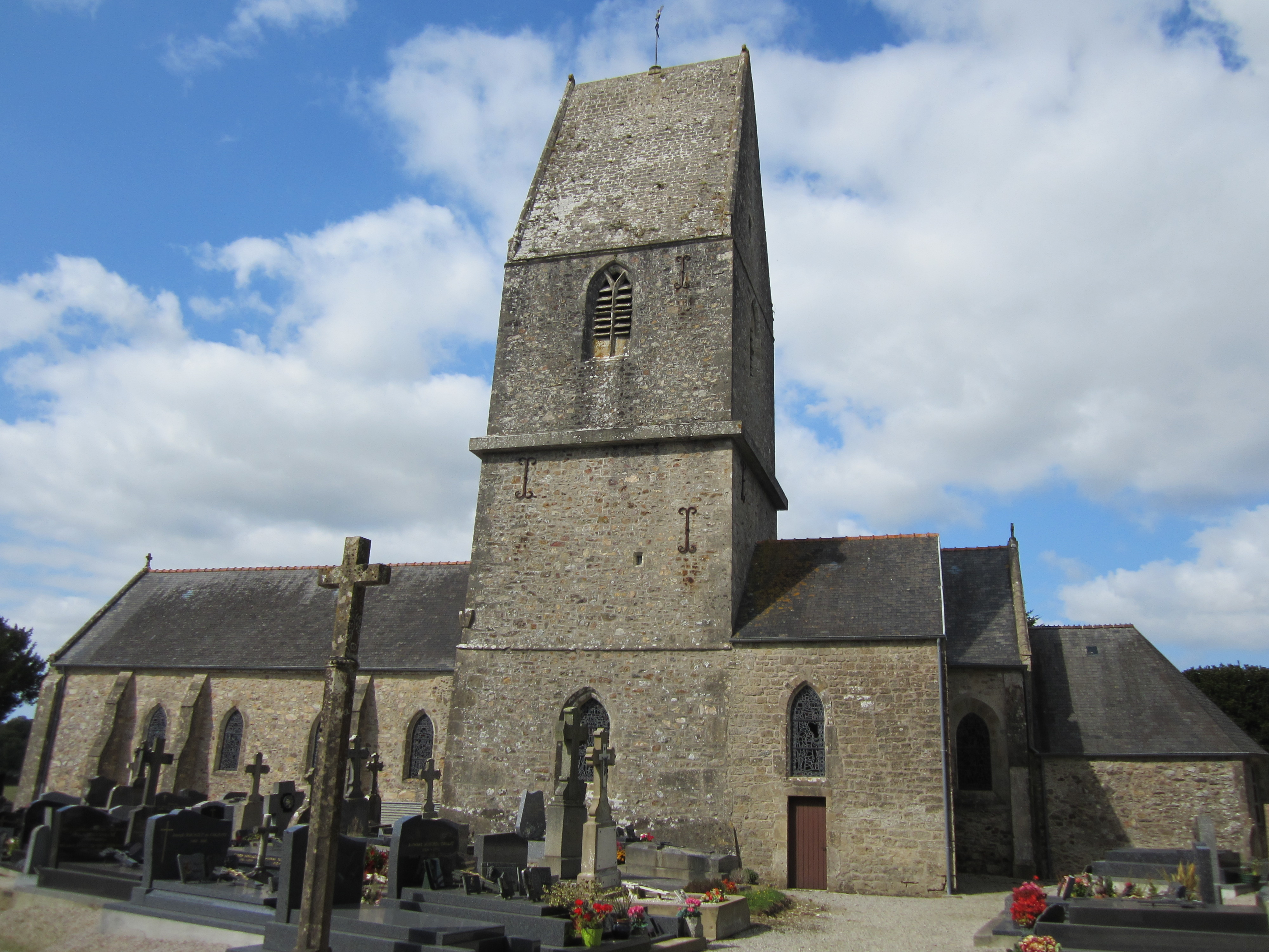 Église Saint-Grégoire de Saussemesnil